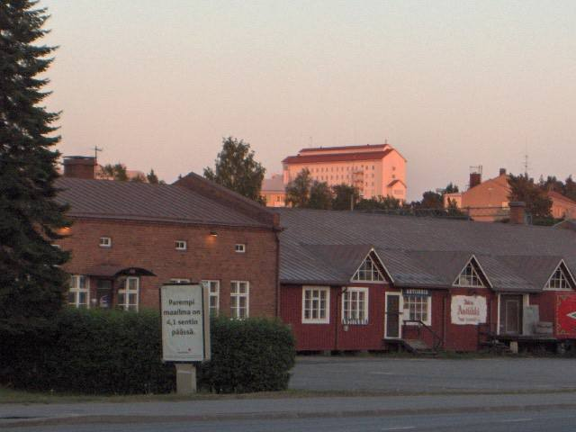 Joensuun rautatieaseman vanhat makasiinit vuonna 2005, taustalla Niinivaara ja keskussairaala. Puu-seinäinen makasiini paloi tuhopoltossa maan tasalle 7.10. 2012.